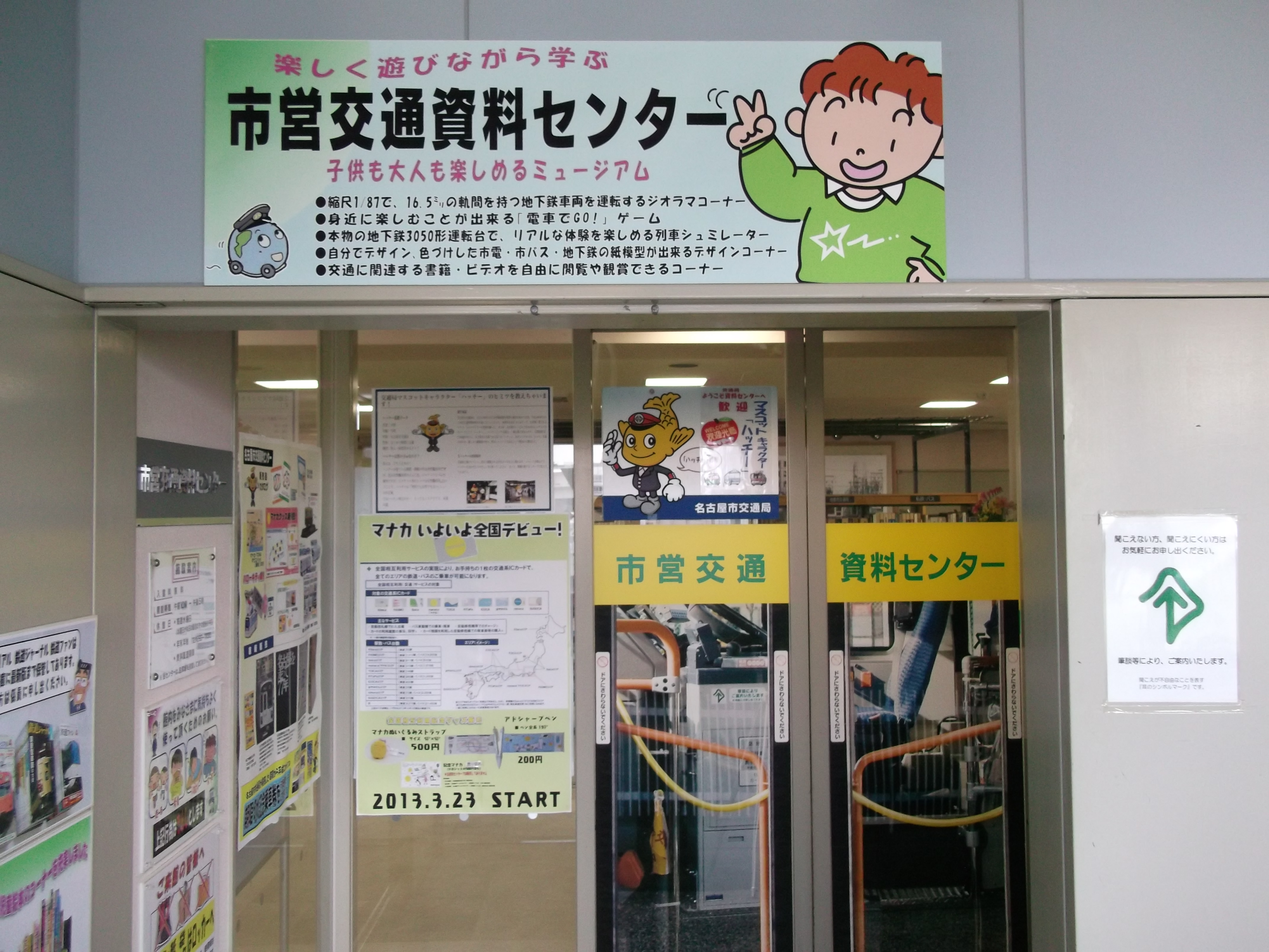 名古屋市中区に所在する市営交通資料センター入口